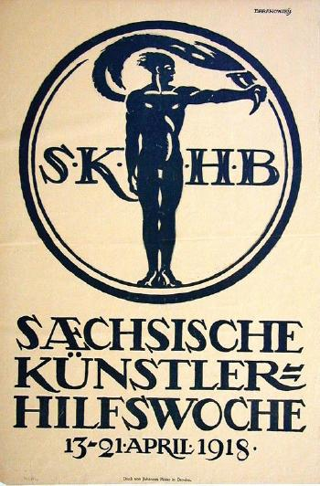 Sächsische Künstler Hilfswoche 13. - 21. April 1918